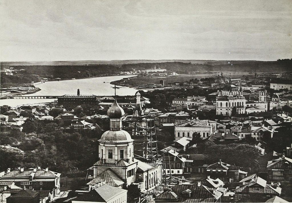 Крымский брод. На переднем плане - храм Ильи Обыденного.